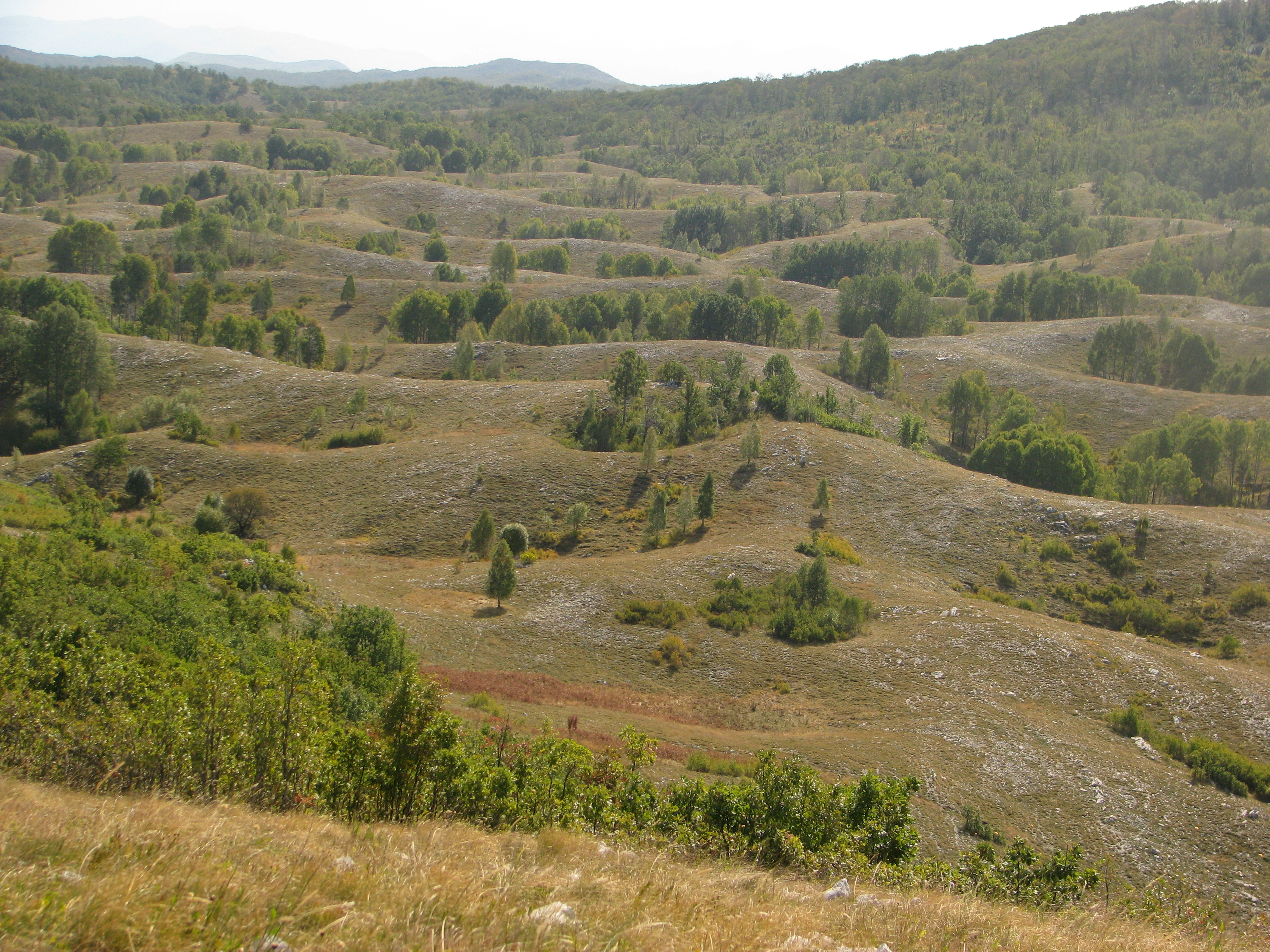 PPP02 Park prirode Viduša, Pogled na bezvodne brežuljke planine Viduše sa rijetkim stablima breze, hrasta medunca i makedonskog cera, na granici između opština Trebinje i Ljubinje